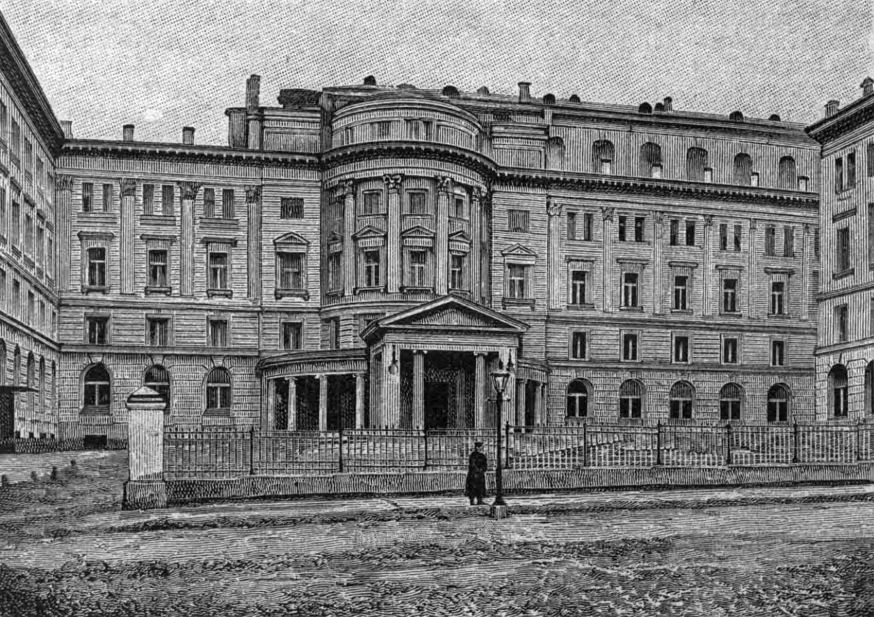 Здание Московской консерватории, 1901 год